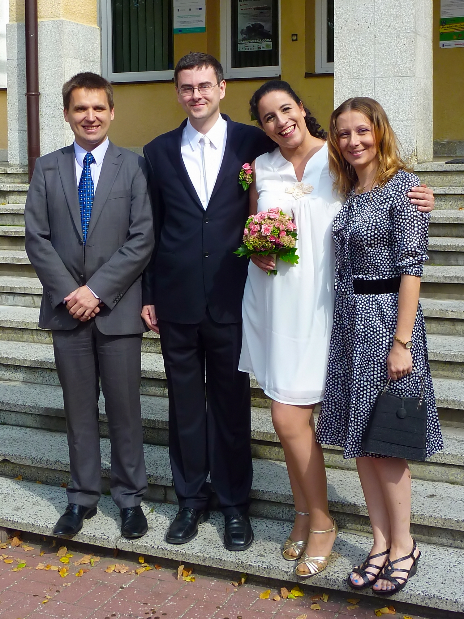 Celestynów 18.08.2012 - ślub Alejandry Guerrero Rodriguez i Bartłomieja Macieji, świadkowie: Monika i Bartosz Soćkowie.